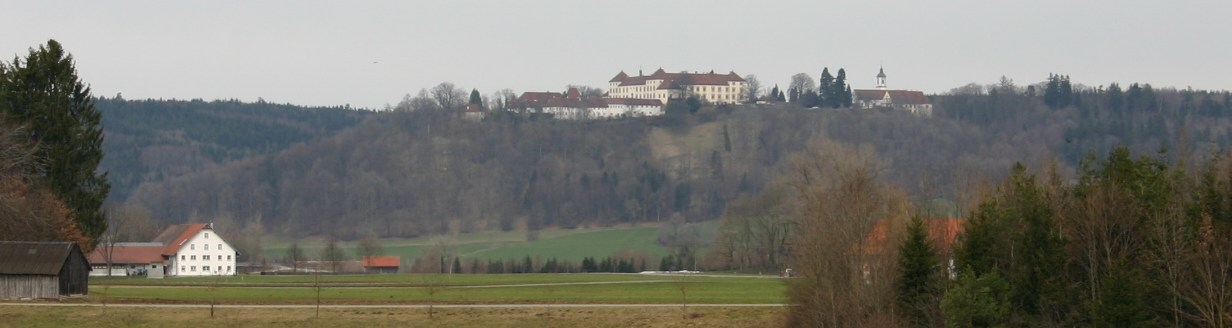 Schloss Zeil, Leutkirch im Allgäu